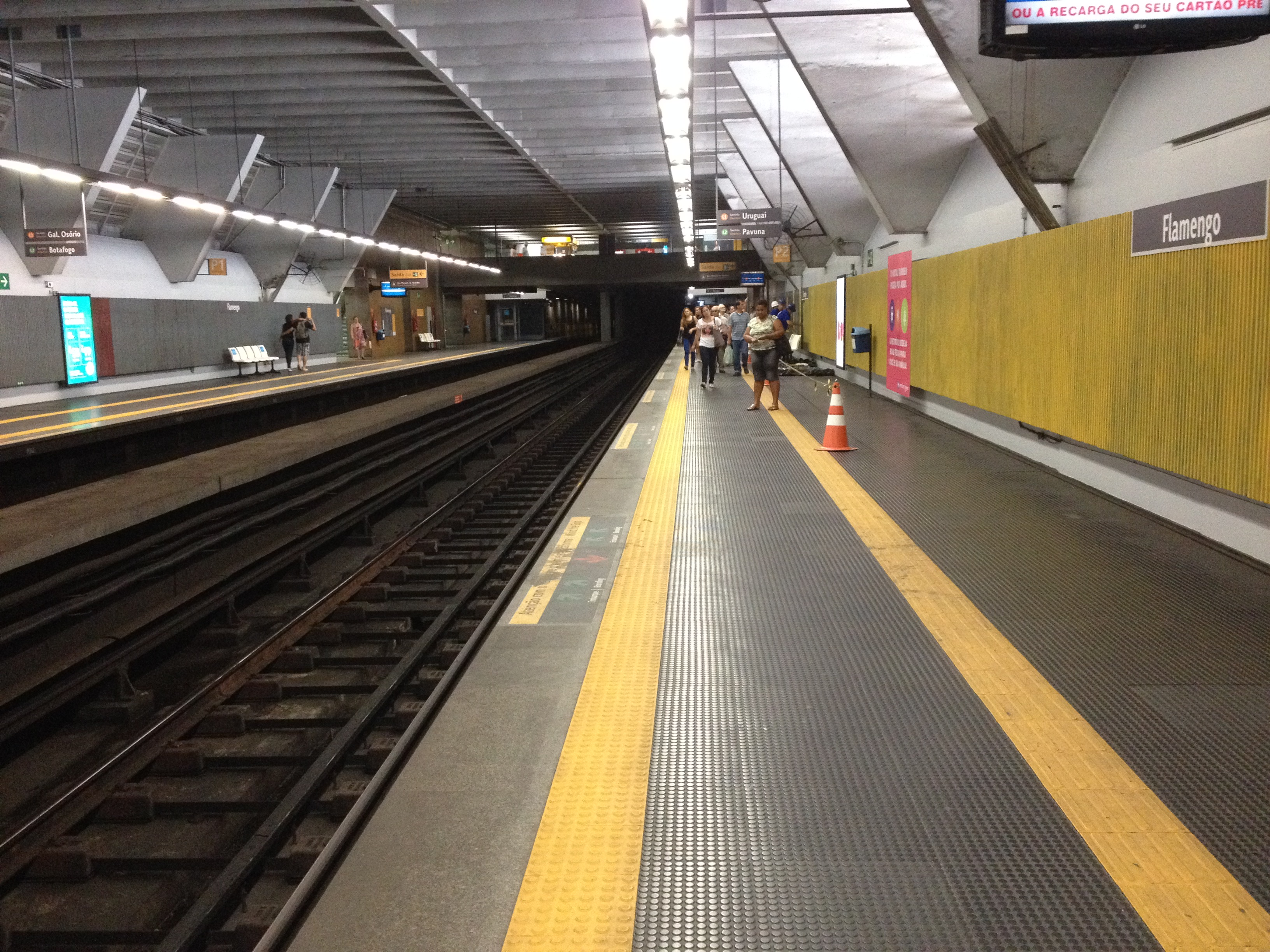 Flamengo